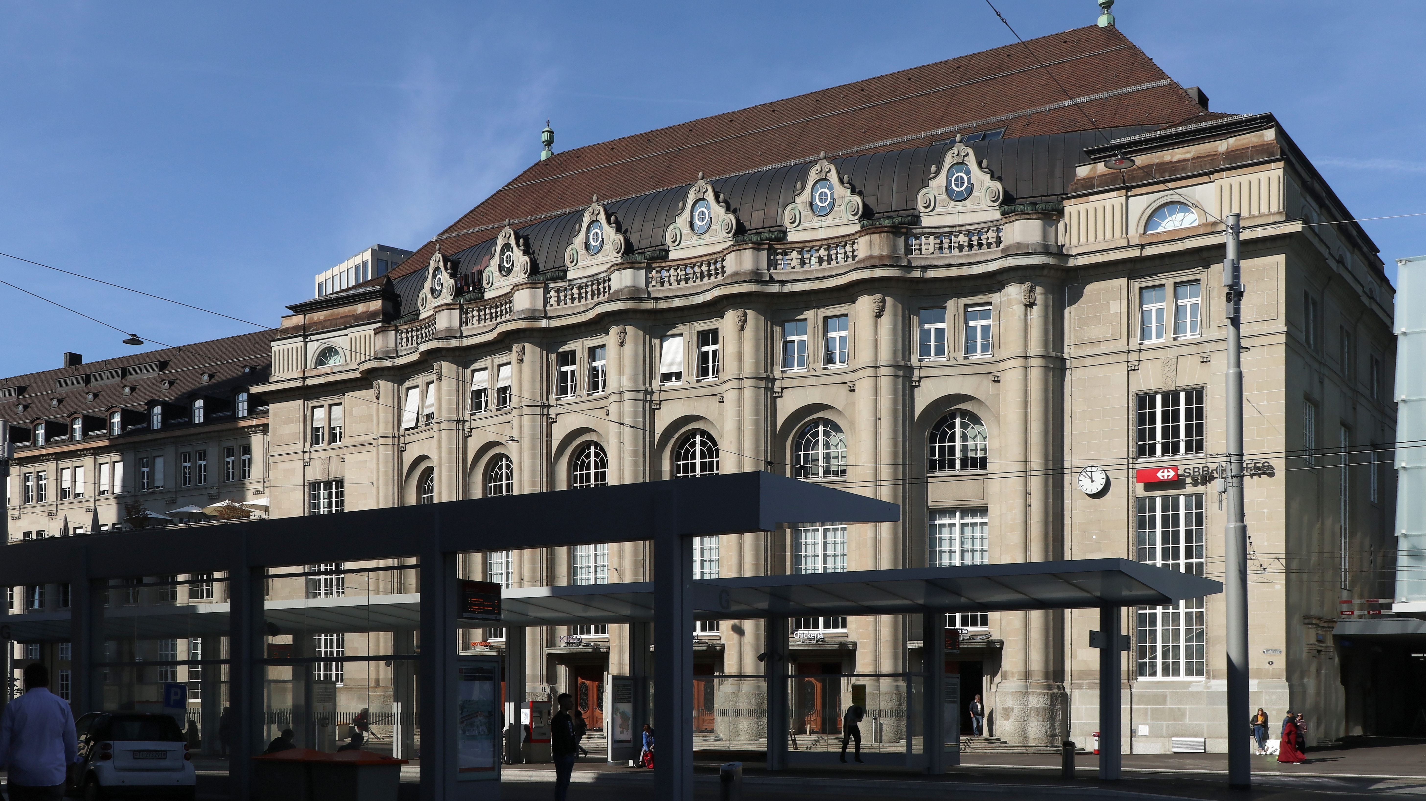 Bahnhof St. Gallen, Schweiz; Blick vom Bahnhofsvorplatz